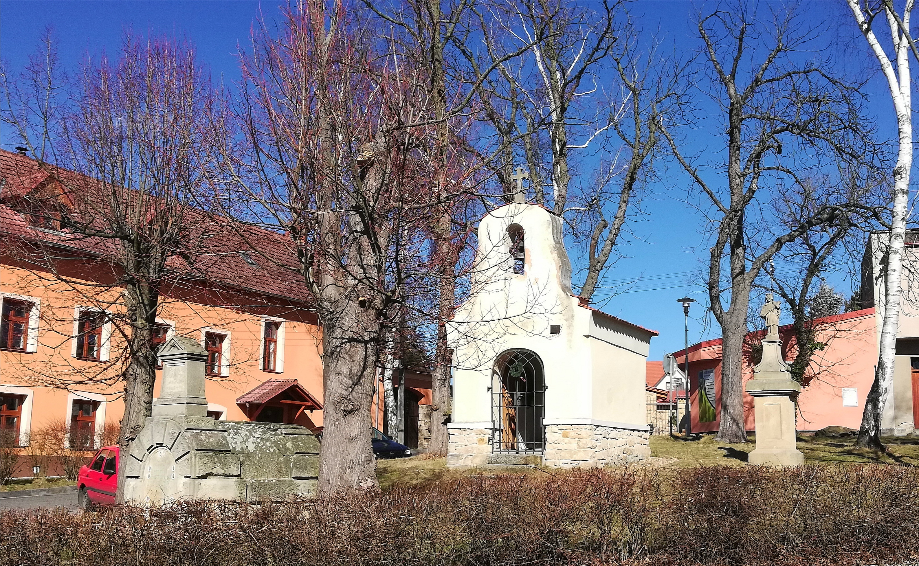 Náves Doksy u Kladna - socha, kaplička a památník obětem světových válek